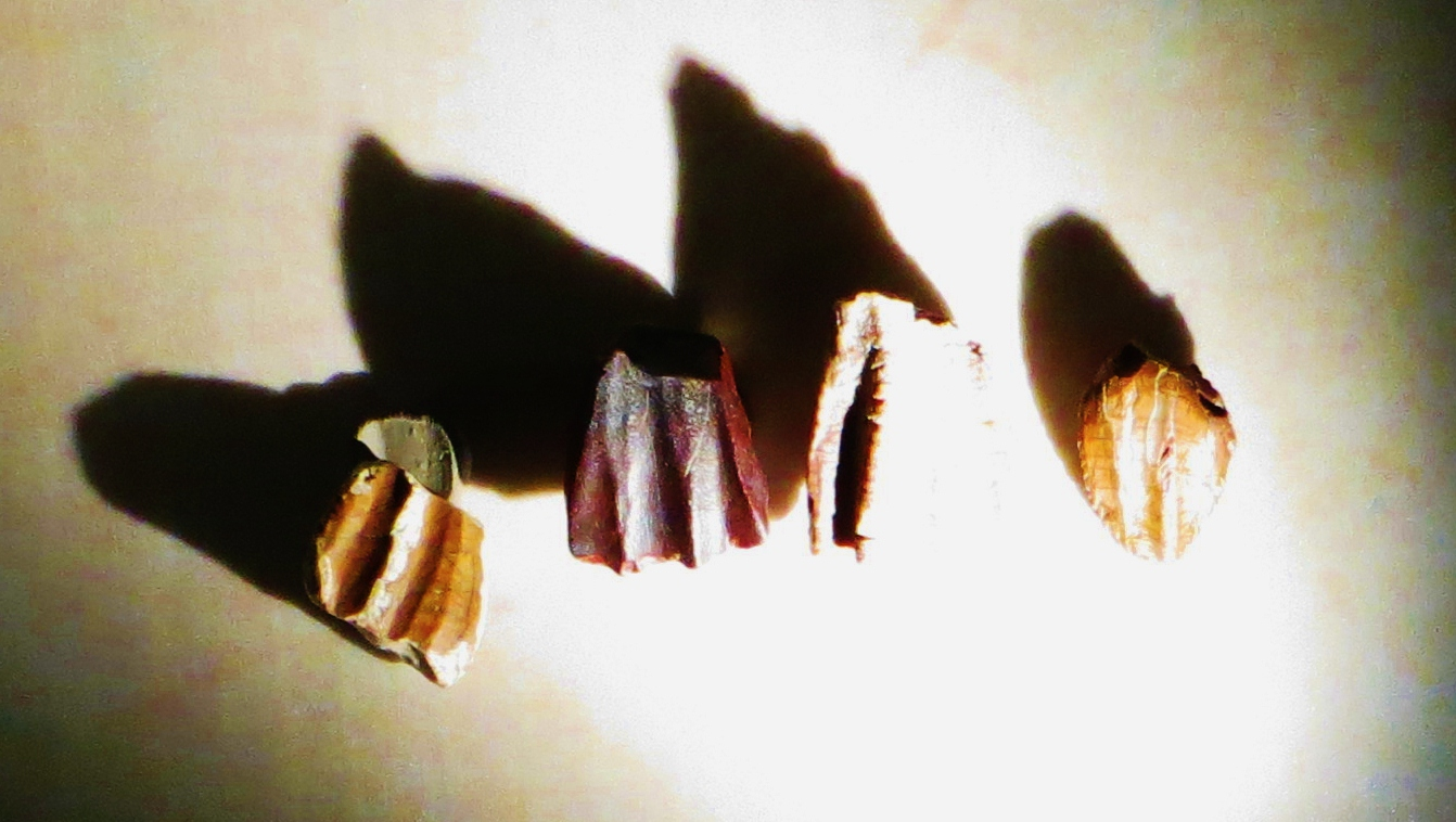 Fossil of Ouranosaurus, an extinct reptile- Took the photo at Museo di Storia Naturale di Venezia